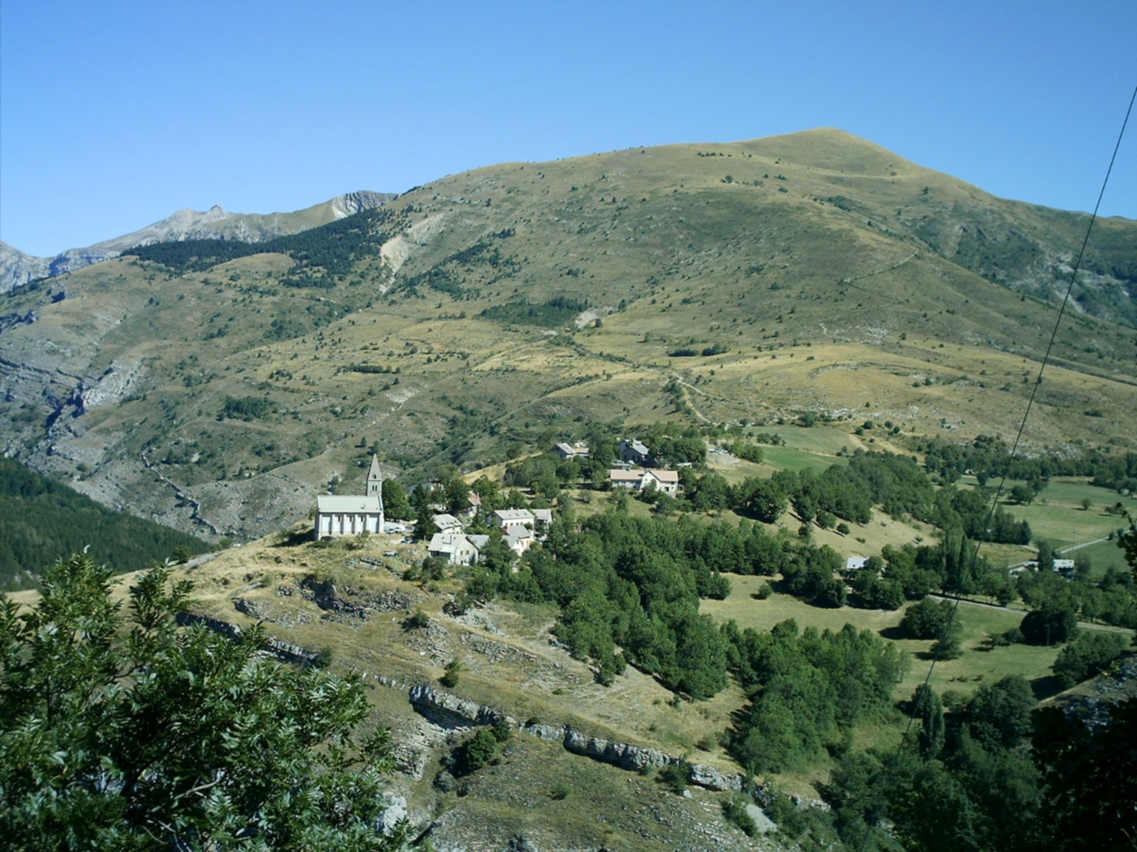 Village de Rabou( Hautes-Alpes, France) vu depuis la route d'acces.